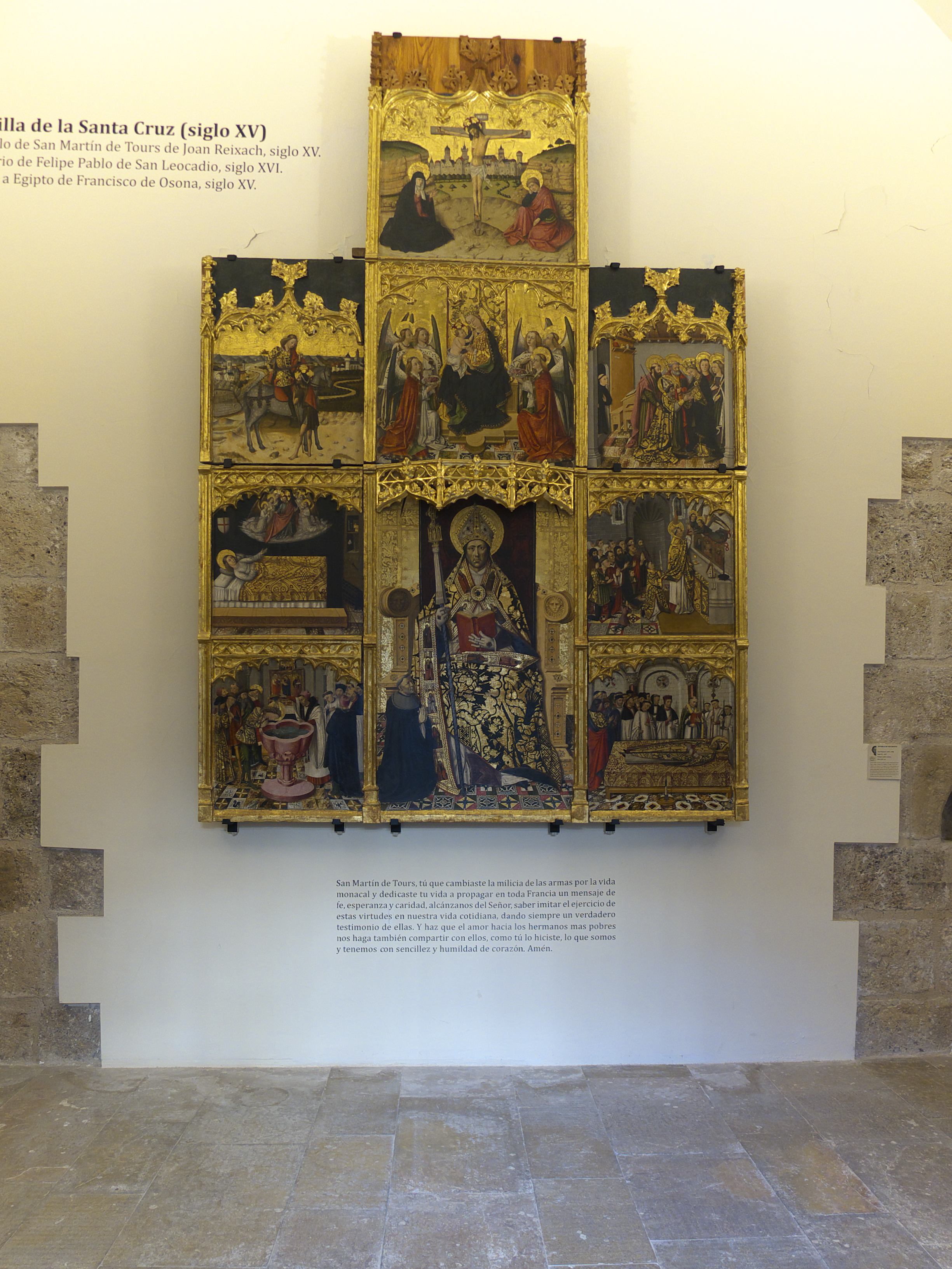 Museo Catedralicio de Segorbe. Retablo de San Martín de Tours.